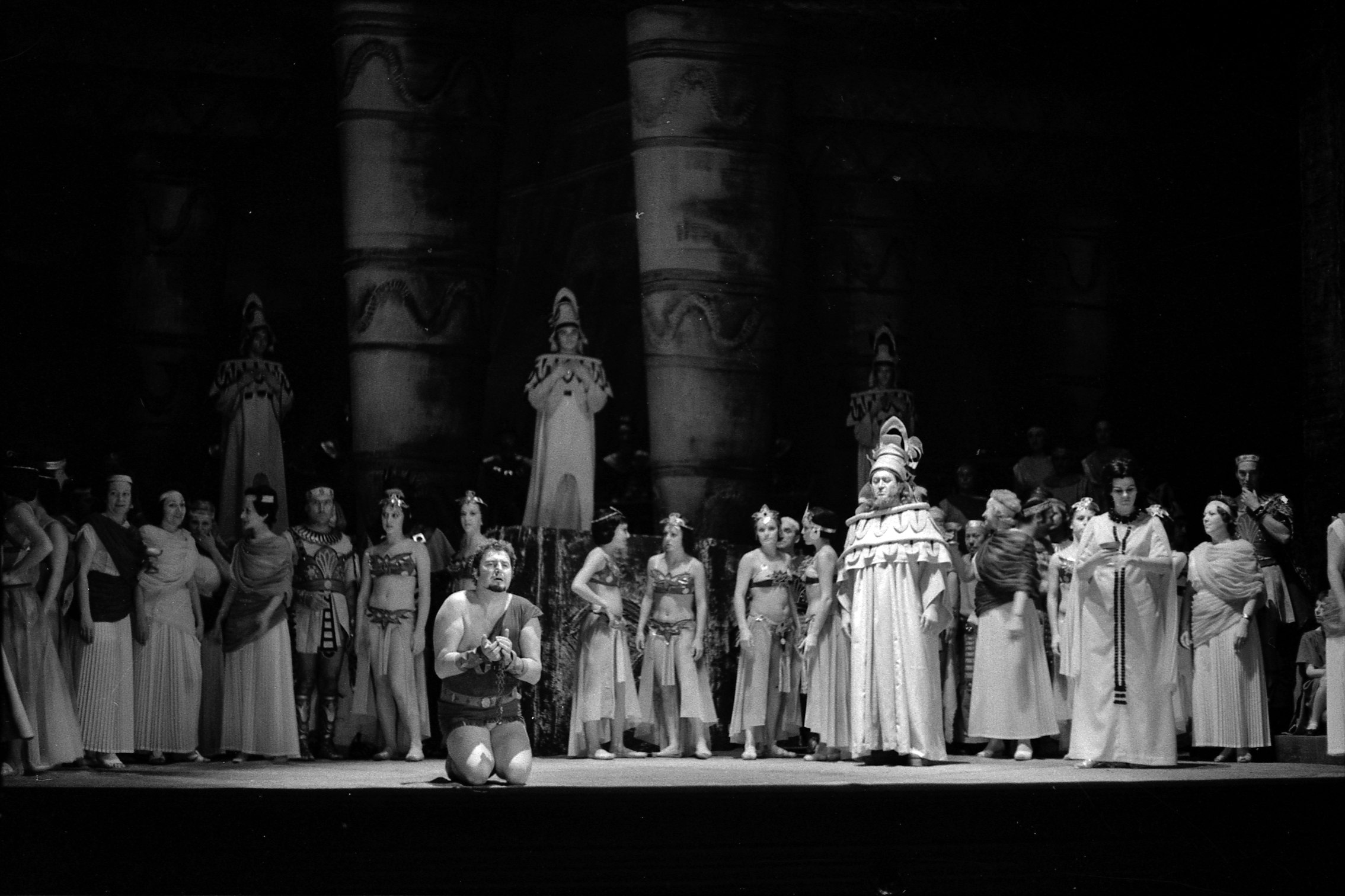 Théâtre du Capitole. Le 14 Octobre 1971. Vue de la représentation de Samson et Dalila au théâtre du Capitole.